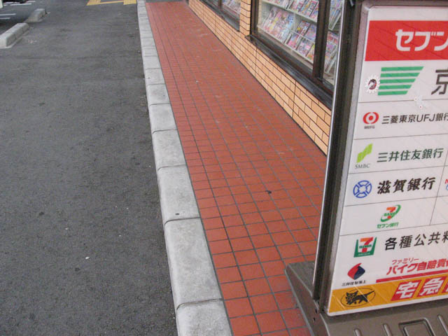 コンビニの犬走り (Inubashiri)